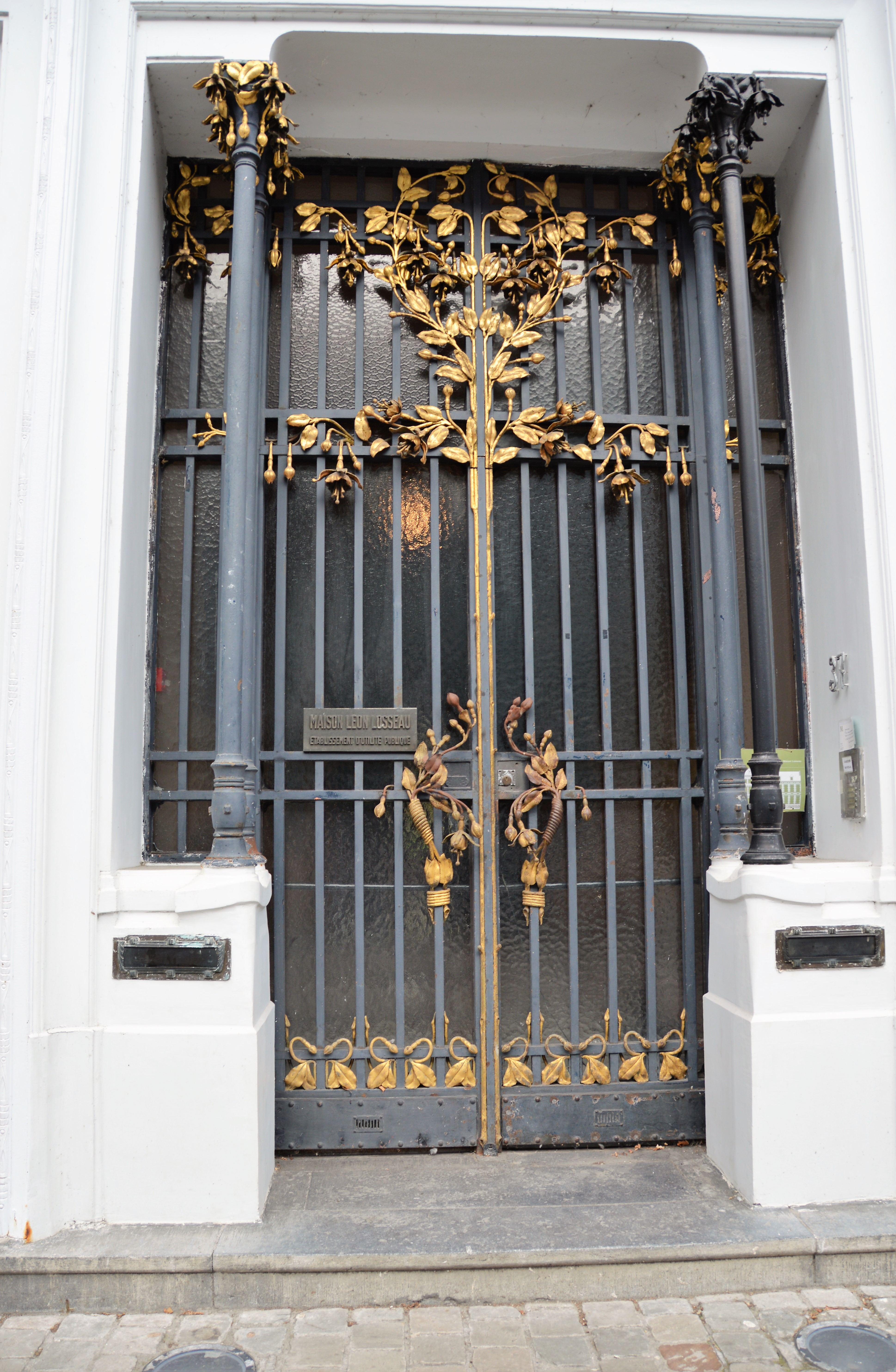 Porte d'entrée en fonte avec feuilles dorées et fleurs de fuchsia This photo of immovable heritage has been taken in the Walloon Region